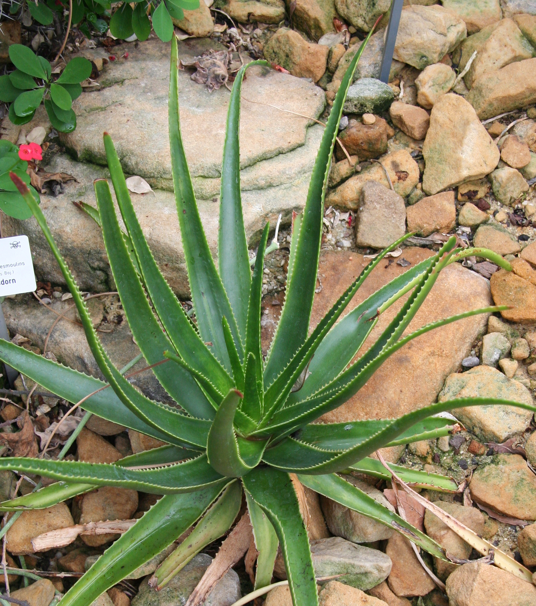 Aloe schomeri im Botanischen Garten Dresden